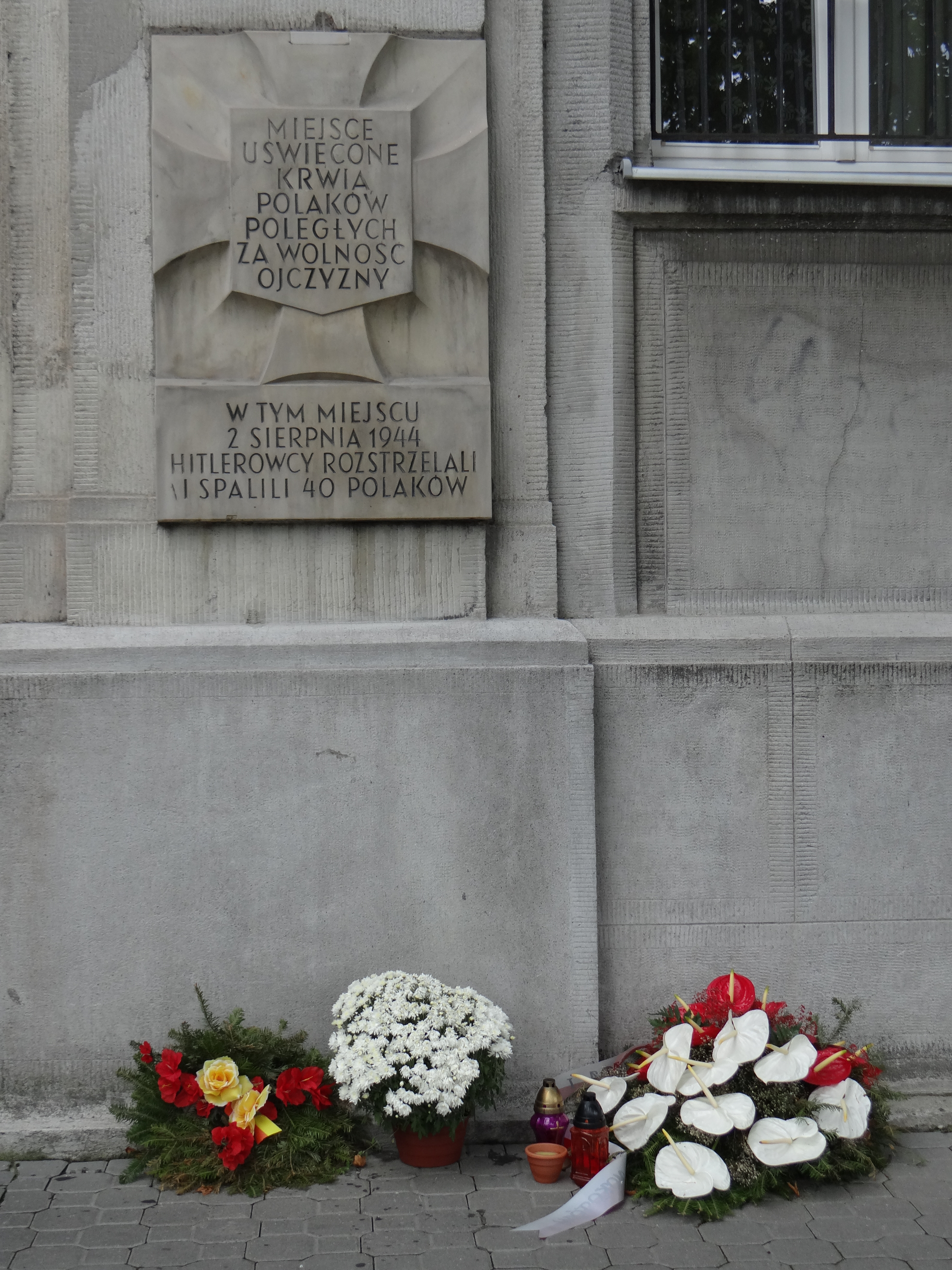 Tablica pamięci umieszczona na elewacji budynku Collegium Bobolanum informuje o rozstrzelaniu i spaleniu w tym miejscu 2 sierpnia 1944 roku przez hitlerowców 40 Polaków